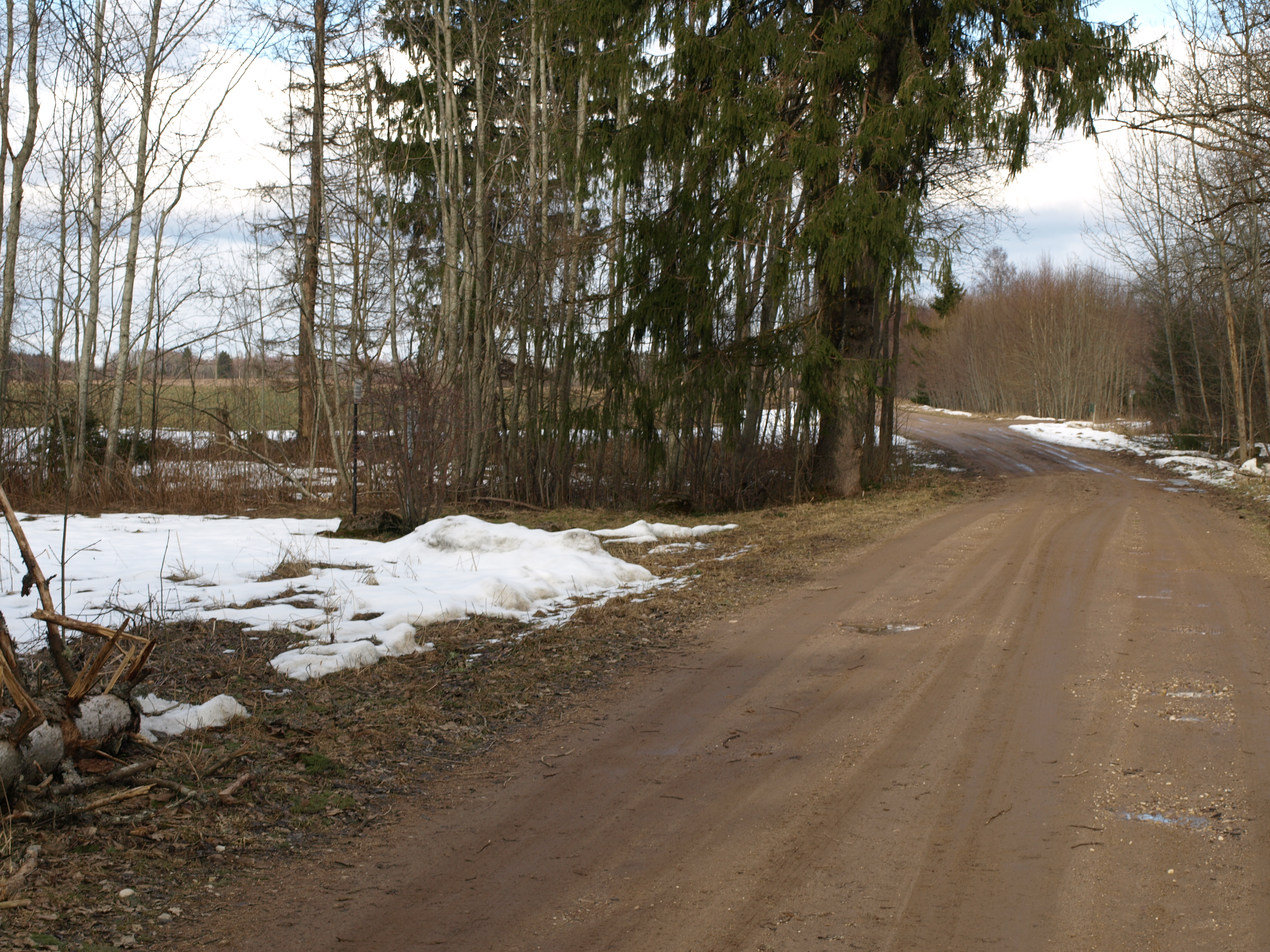 Kivikalme "Madi kalm"